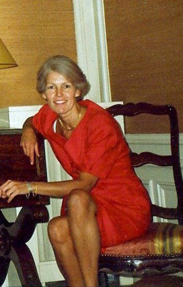 photographie de l'auteur, Brigitte François-Sappey